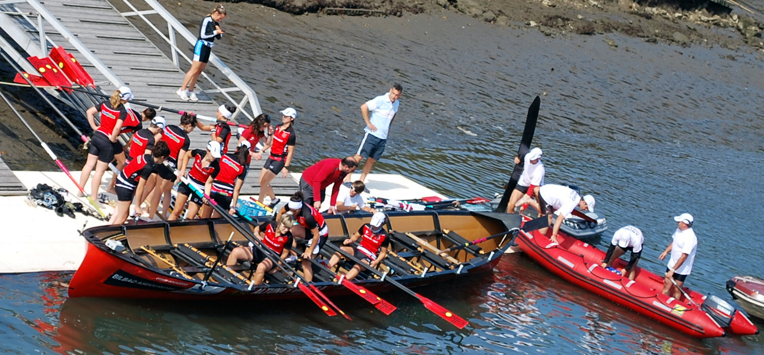 Embarquement de l'équipage de Zumaia lors de la régate de Zumaia - Guipuscoa)